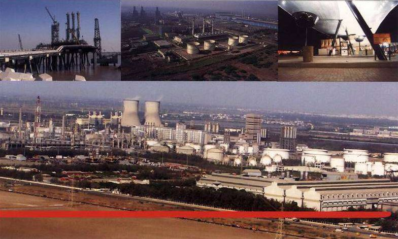 Template:Sonani Nagri Hazira.